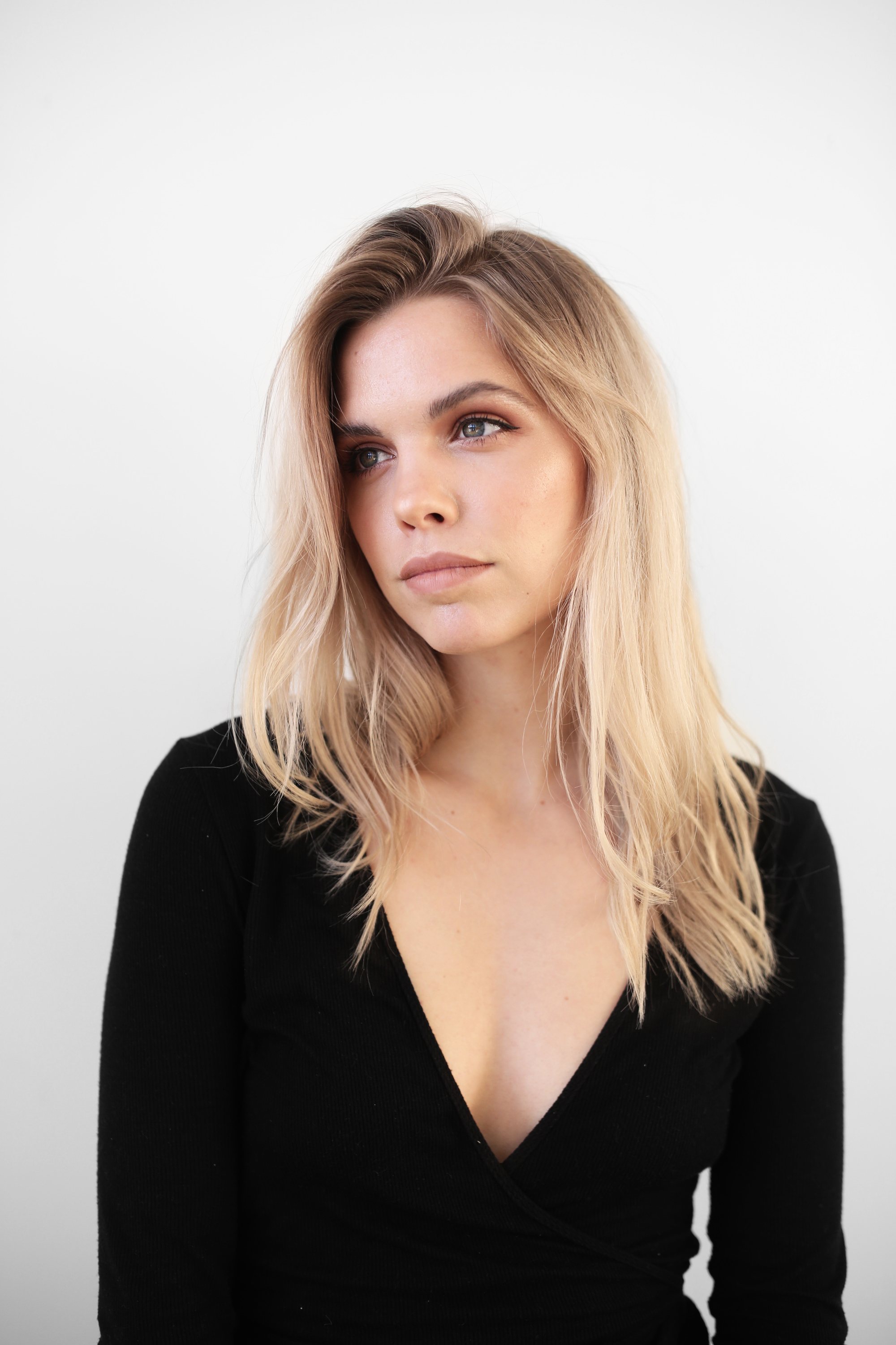 Flora